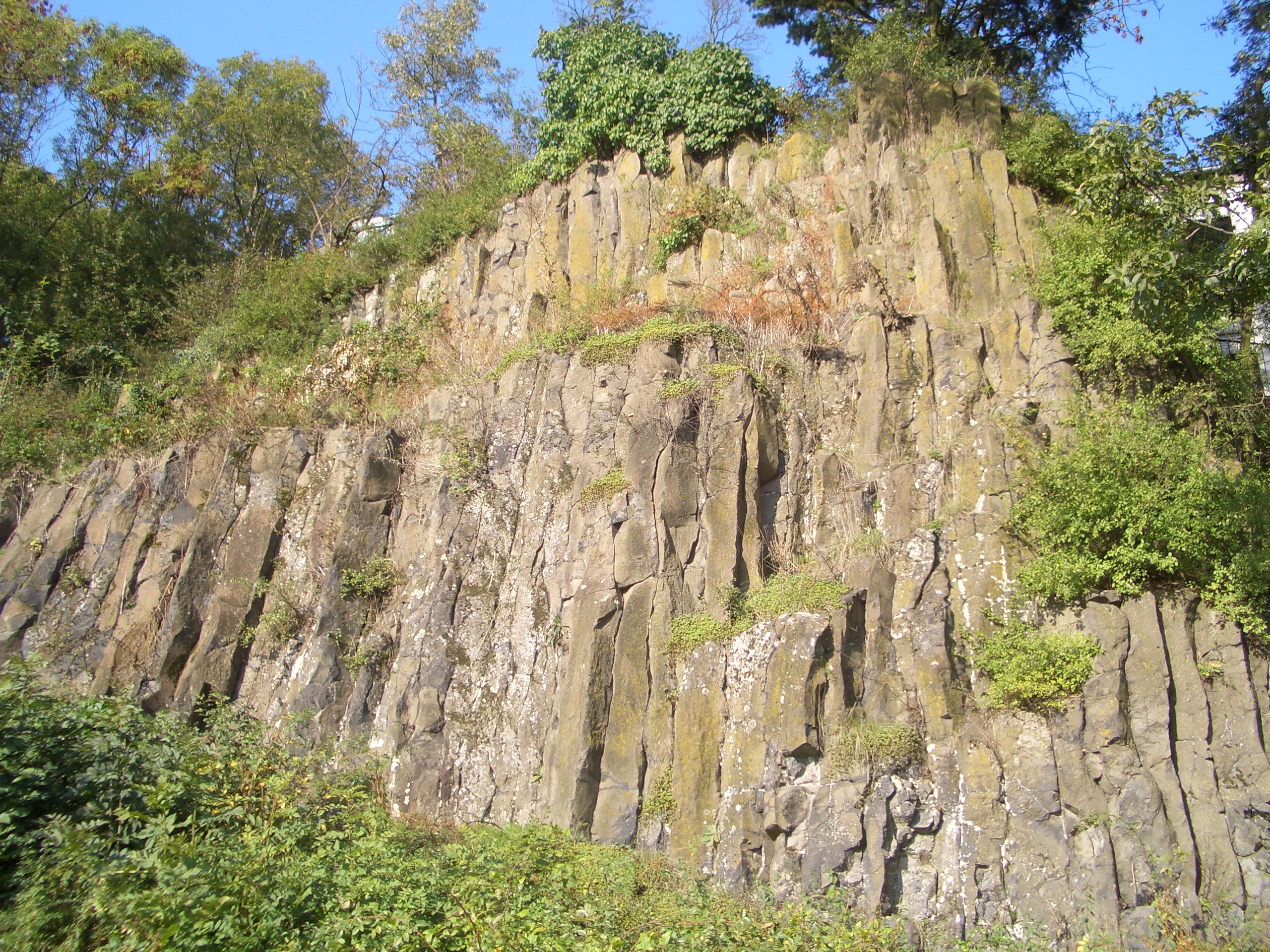 Nephelin Säulenbasalt am erls. Vulkan Otzberg